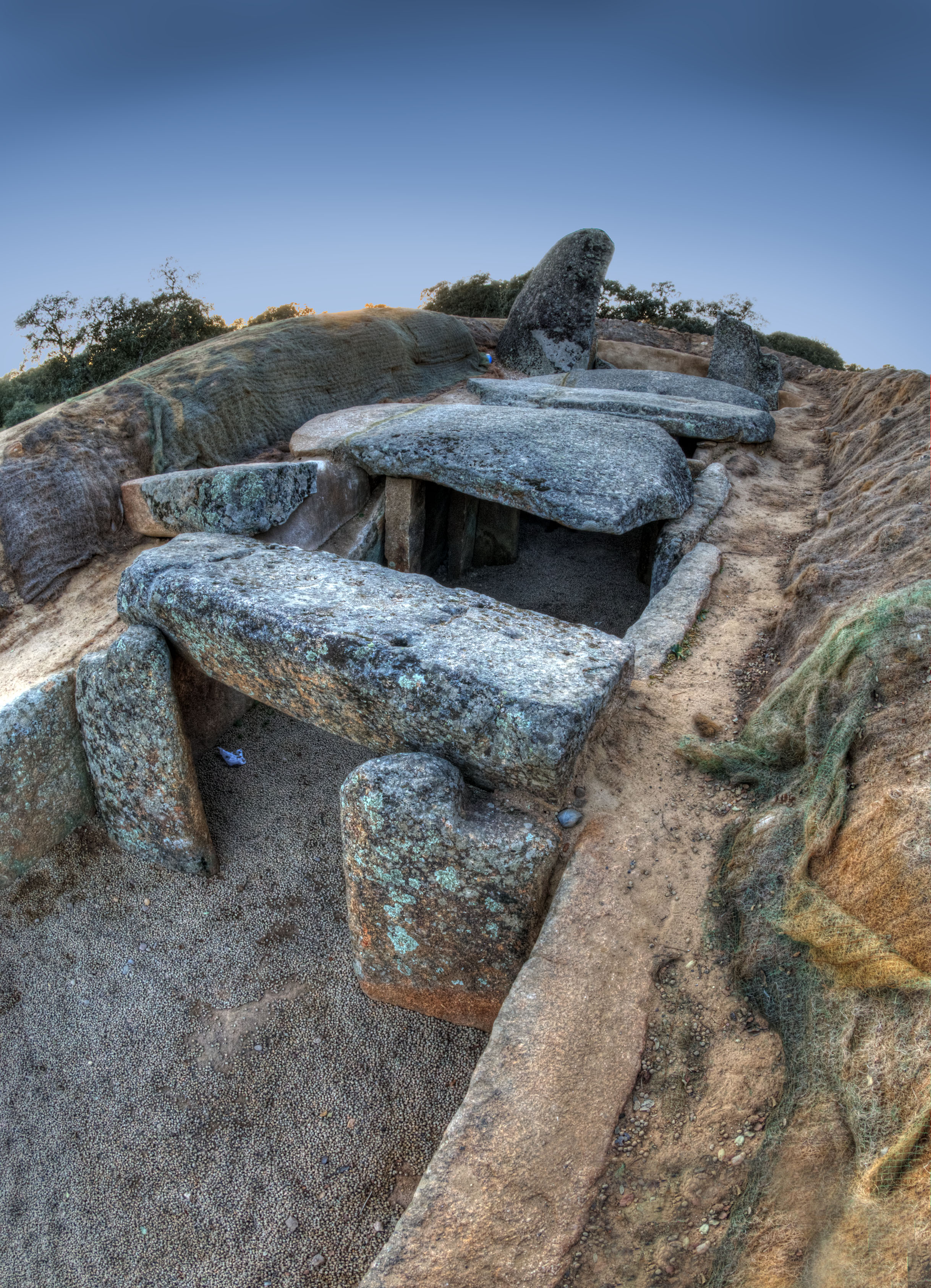 Este dolmen, fechado entre los 3000 y 4000 a.C., fue utilizado como sepulcro en la época de Calcolítico. Su corredor mide unos 20 m y da acceso a una cámara que, por el ortostato mayor, tuvo unos 5 m de altura.